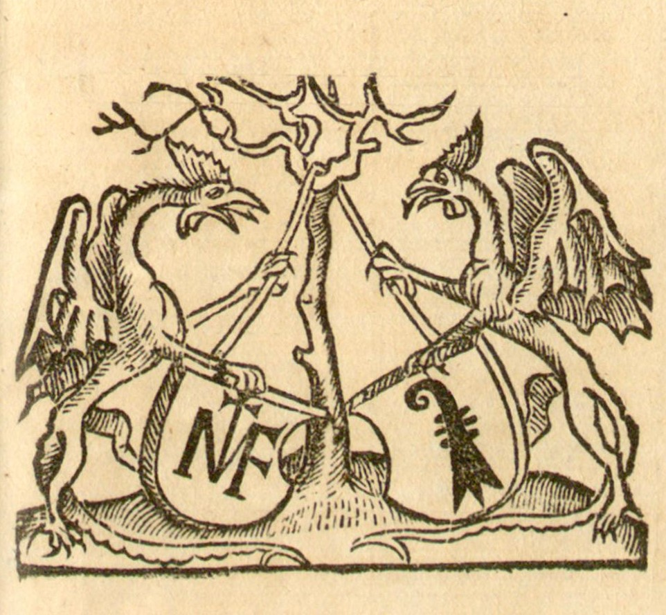 Druckerzeichen von Michael Furter, 1506/1507 (Universitätsbibliothek Basel)